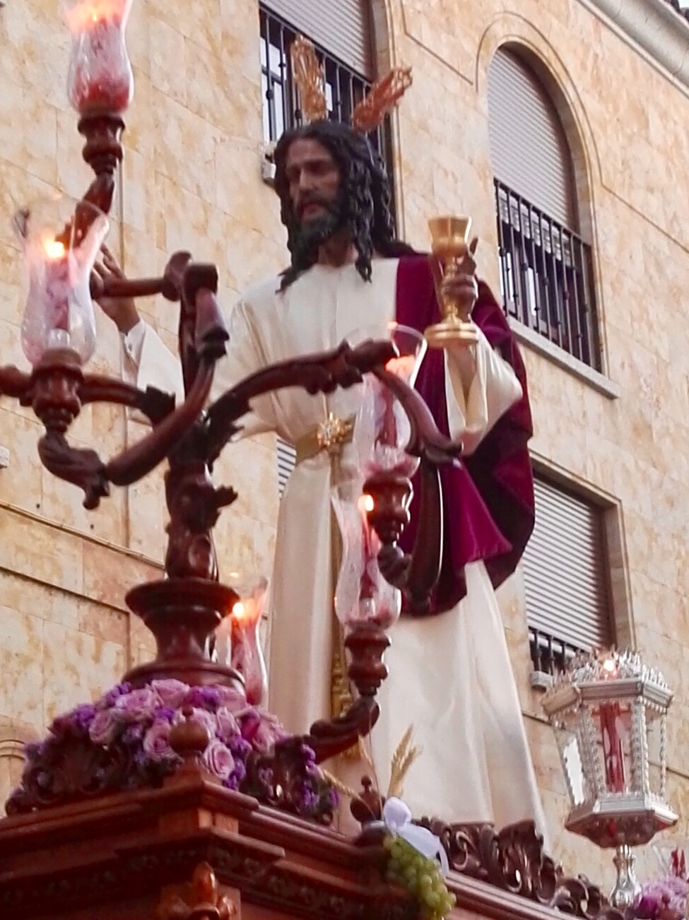 Imagen de N.P. Jesús de la Redención, obra de José Antonio Navarro Arteaga para la Archicofradía del Rosario de Salamanca, desfilando en la procesión del Rosario de 2016 de manera extraordinaria por el VIII Centenario de la fundación de la Orden de los Dominicos.